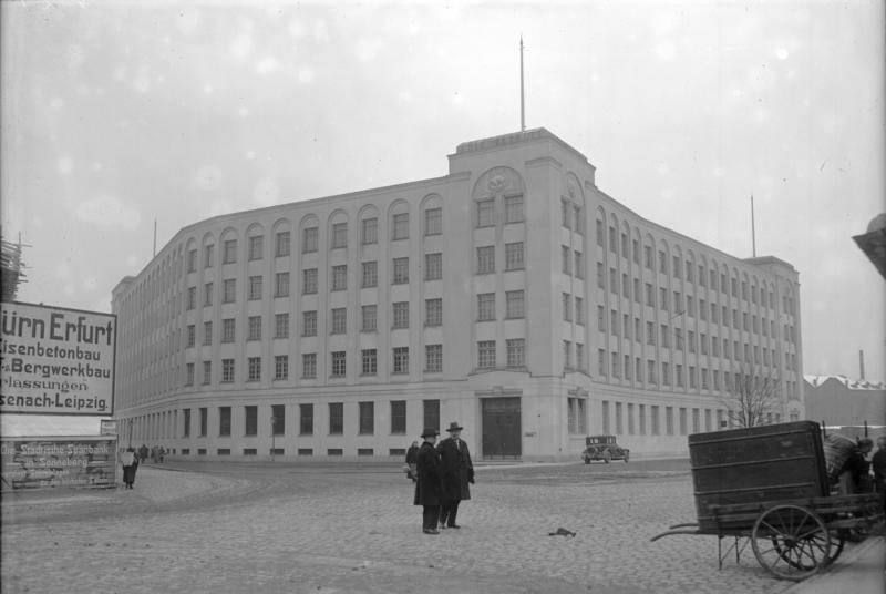 Woolworth in Deutschland! Das große Woolworthgebäude in Sonneberg i./Thür. in welchem der gewaltige amerikanische Conzern seine Büroräume für den Wareneinkauf in Deutschland untergebracht hat.